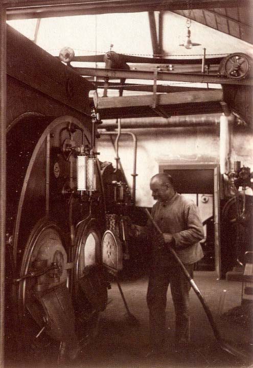 Kesselhaus der Fa. Gebr. Klingenberg in Detmold